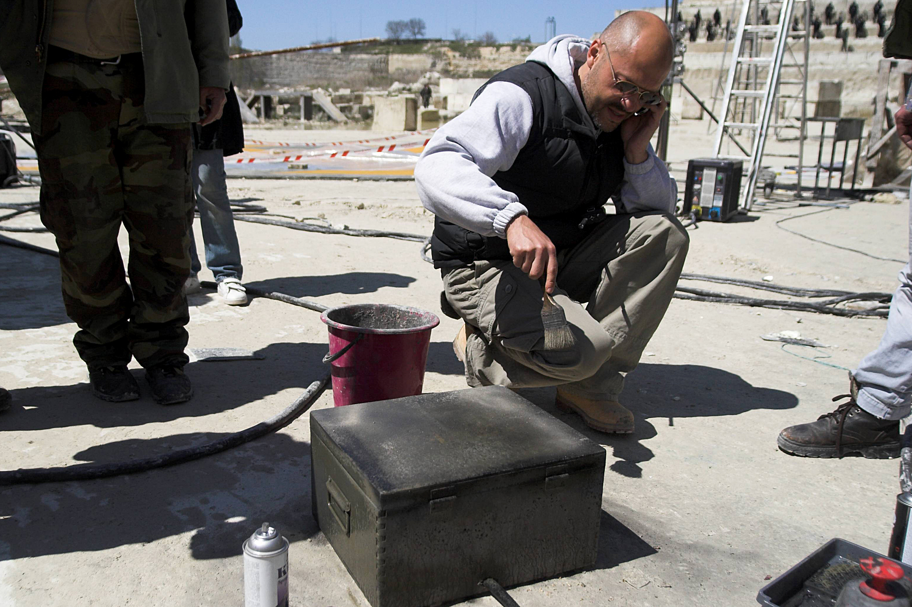 Фёдор Бондарчук на съёмках фильма "Обитаемый остров" This work is free and may be used by anyone for any purpose. If you wish to use this content, you do not need to request permission as long as you follow any licensing requirements mentioned on this page.